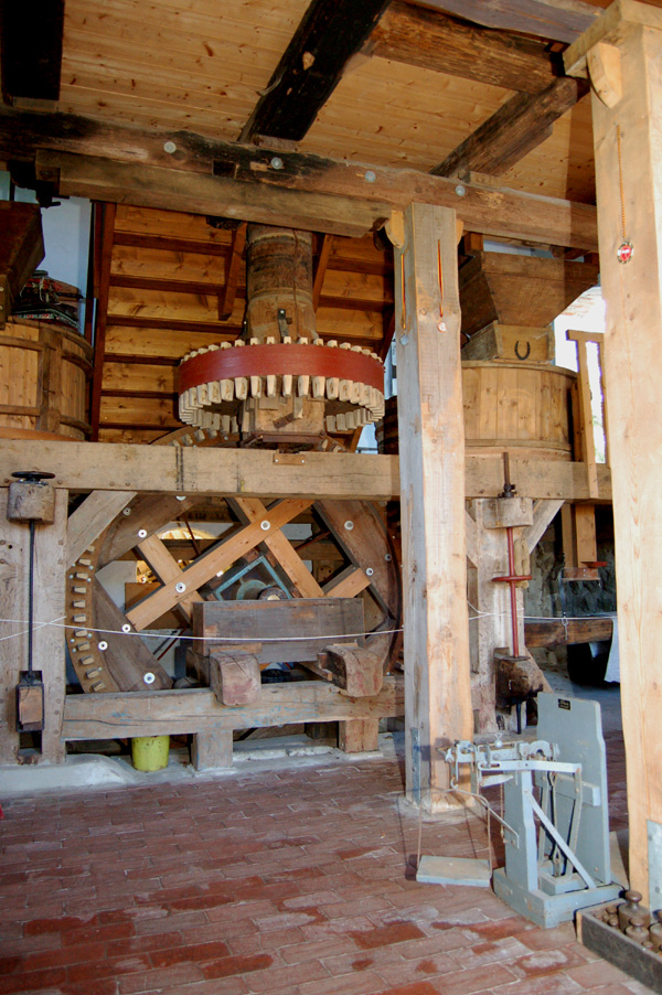 Wassermühle Bademühlen Ansicht der Technik